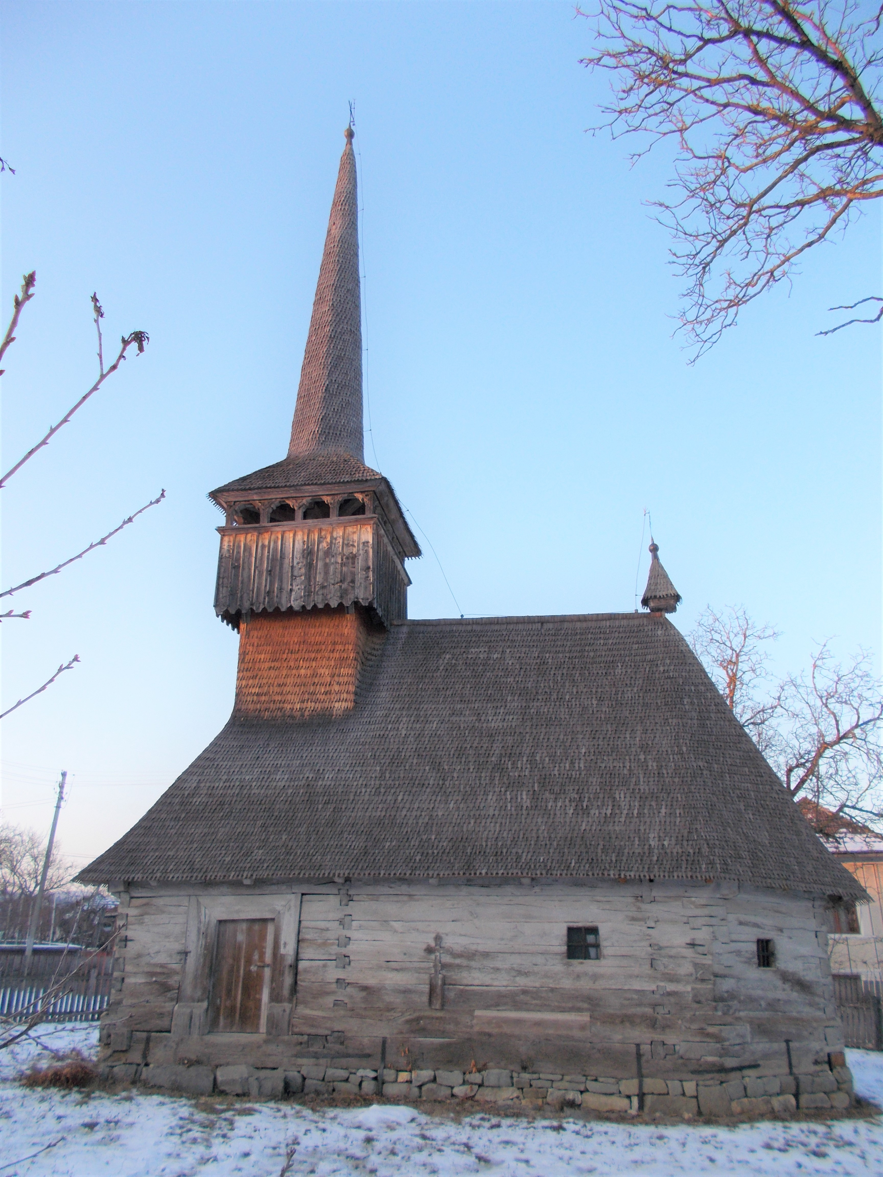 Biserica de lemn „Sf. Maria” din Letca, Sălaj